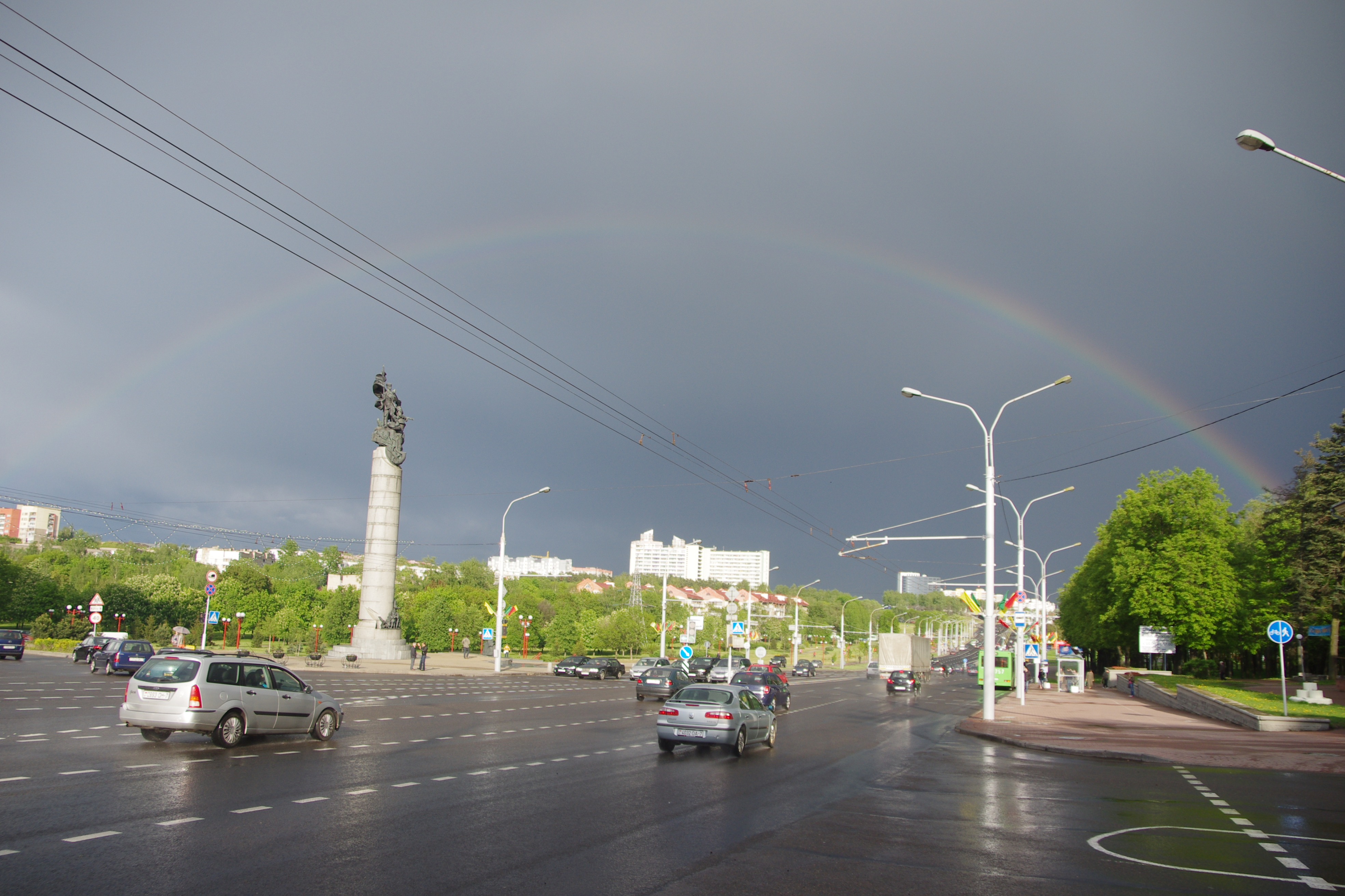 Беларусь партызанская і праспект